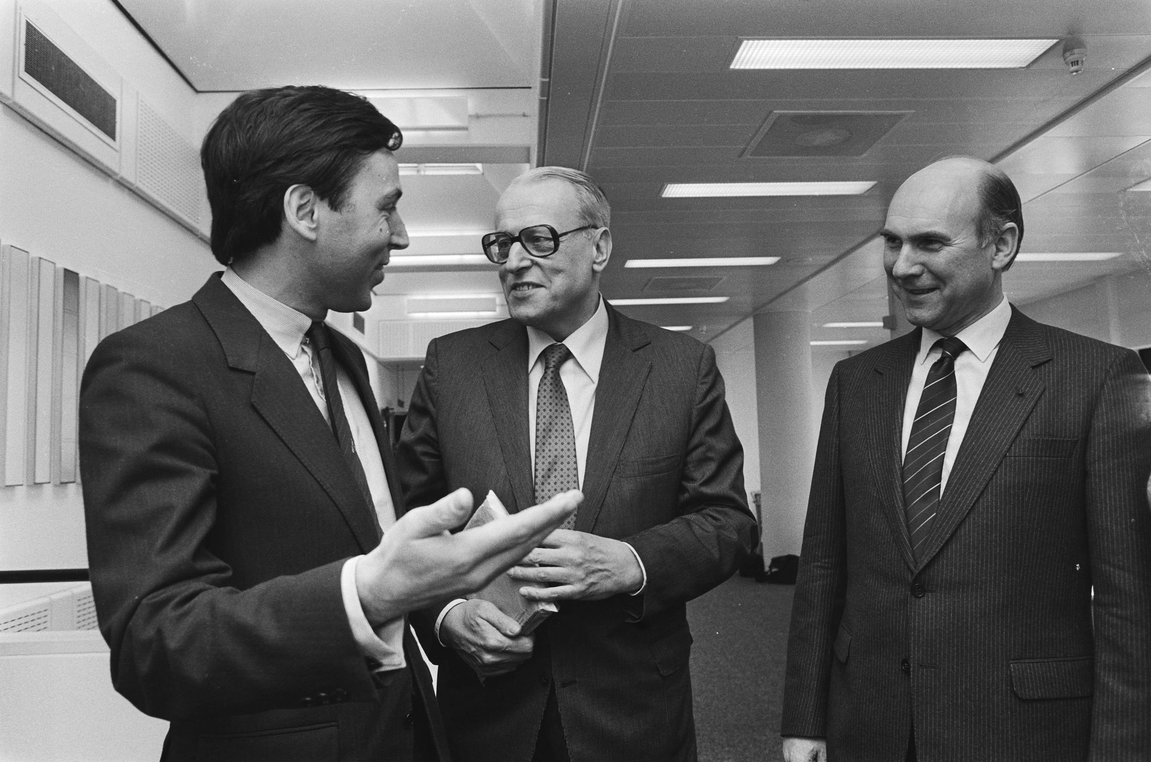 Nationaal Letterkundig Museum in Den Haag officieel geopend door minister Brinkman; Brinkman (links) in gesprek met schrijver W.F. Hermans. Rechts Wim Koops, voorz. bestuur Letterk. Museum. 20 april 1985